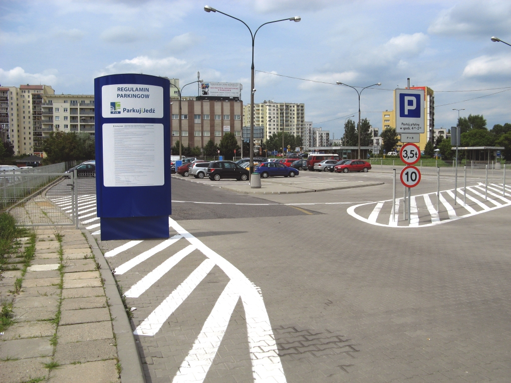 Parking P+R Metro Stokłosy przed przebudową.